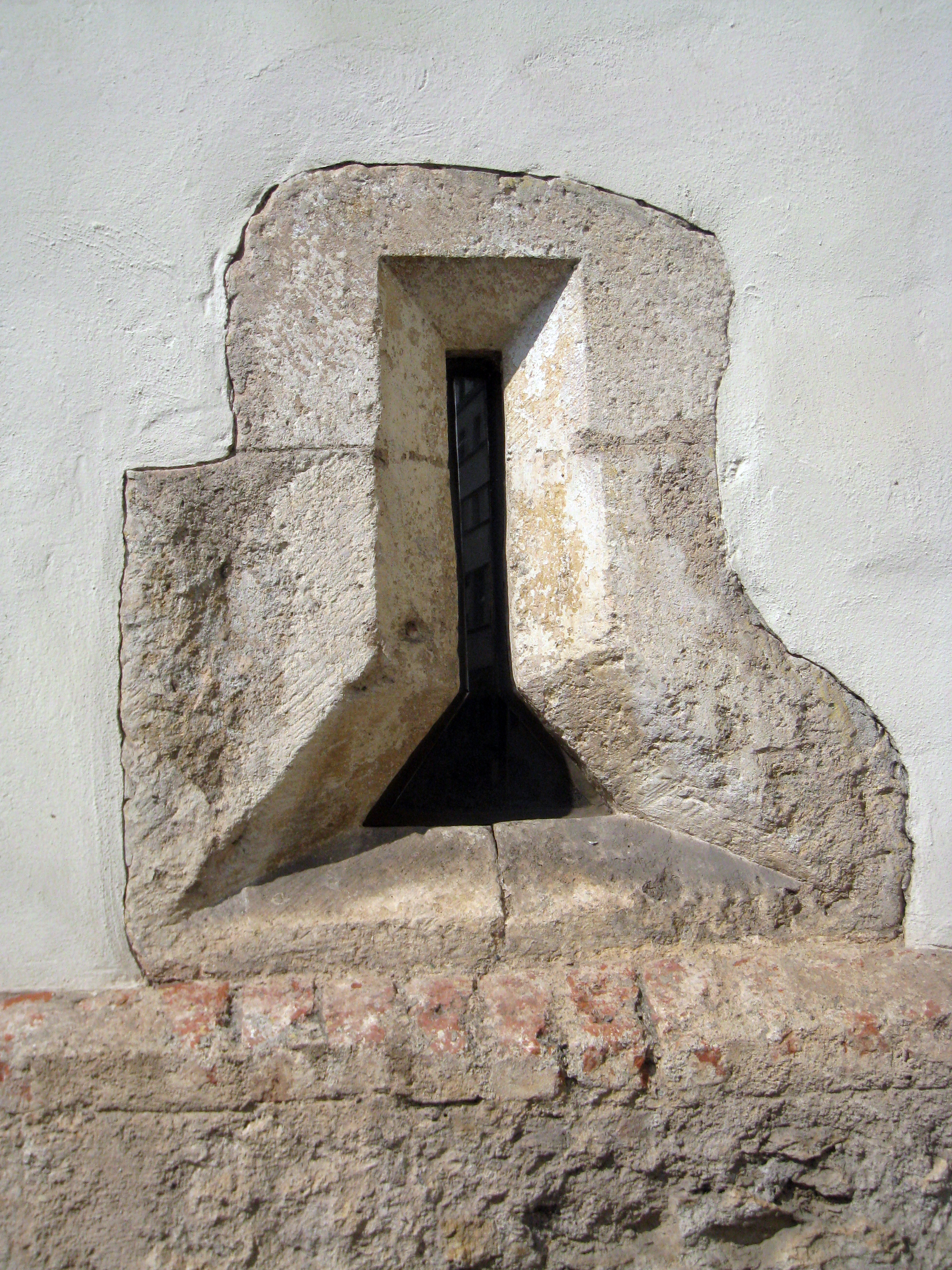 Weisseneggerhof in Graz, Schlüsselscharte